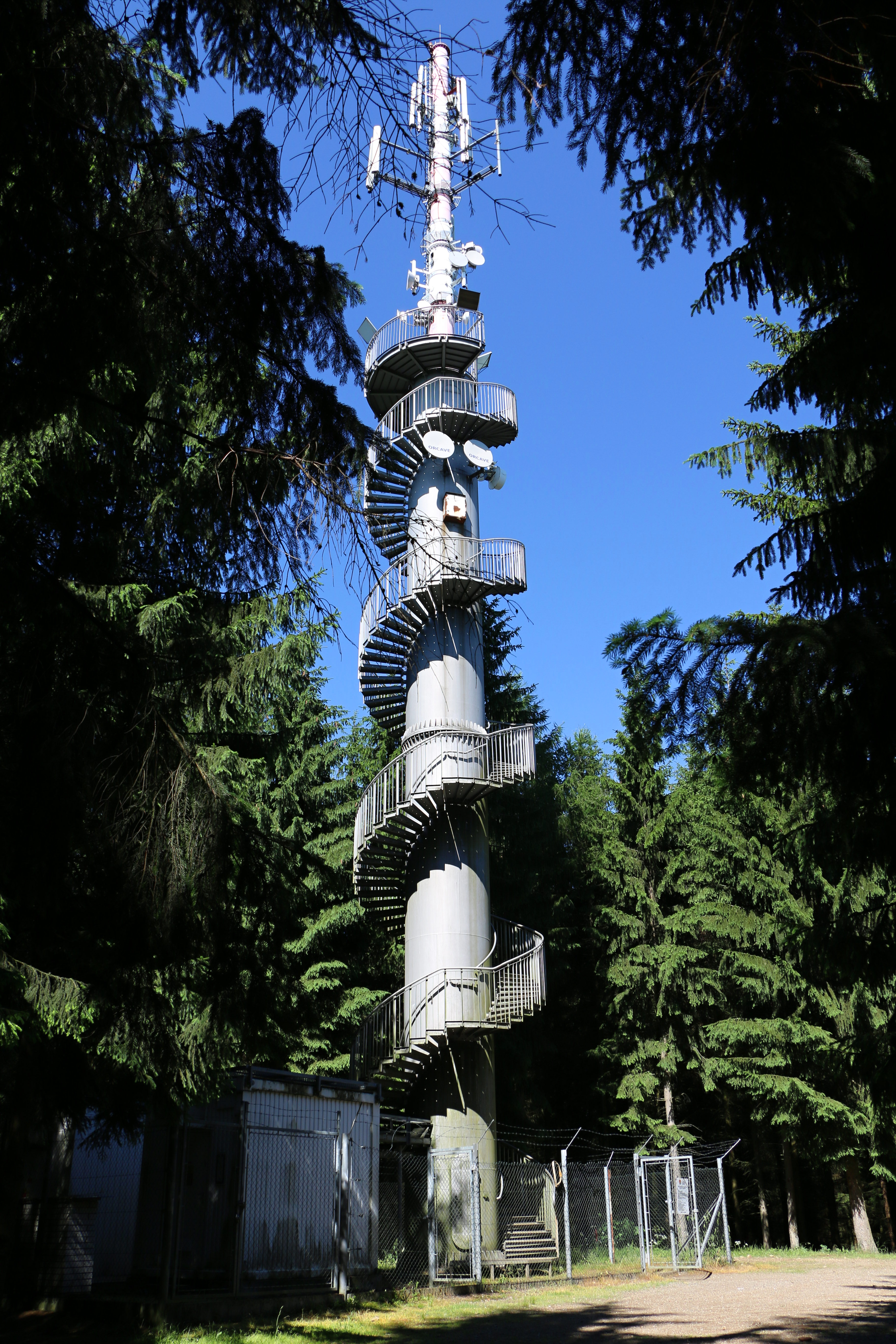 Rosička (rozhledna) z 18.6.2016